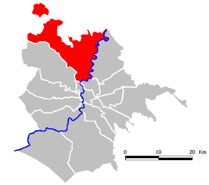 Municipio Roma XV